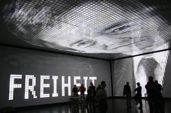 Pixel-Video-Wand mit 20.000 LED